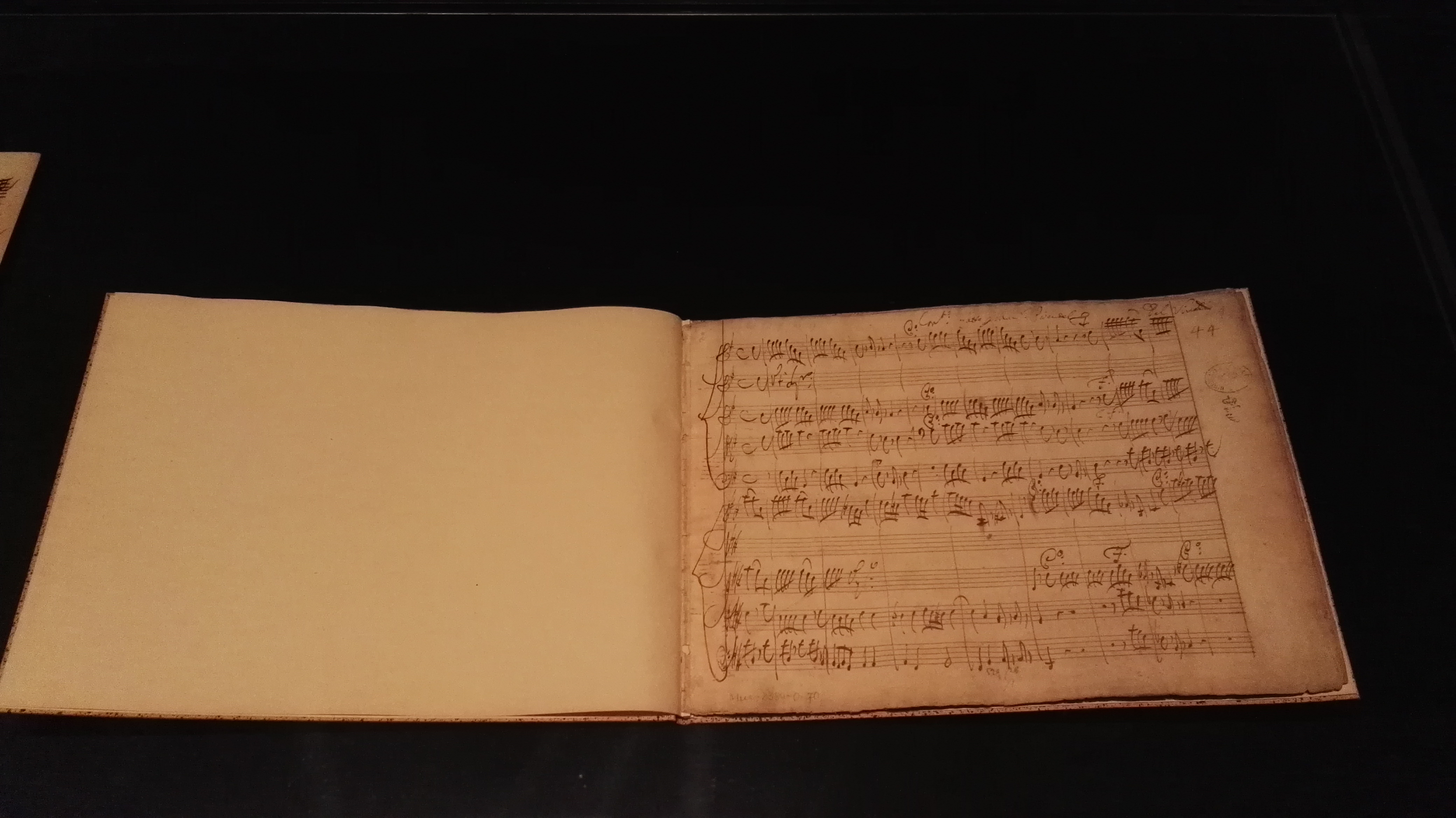 Antonio Vivaldi: Violinkonzert G-Dur R314; vom Autor geschriebene und Johann Georg Pisendel gewidmete Partitur im Buchmuseum in Dresden